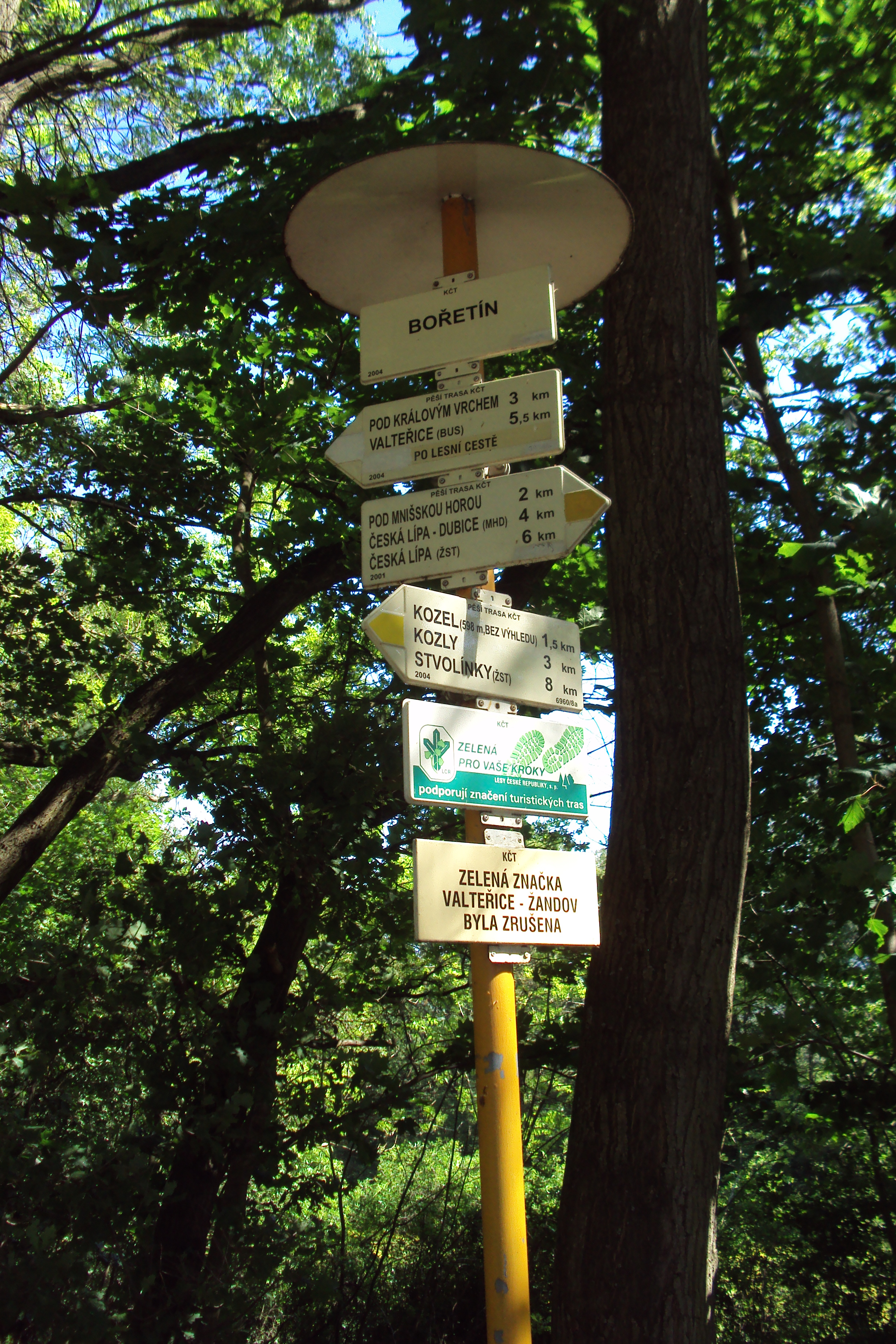 Rozcestník v obci Bořetín nad Českou Lípou